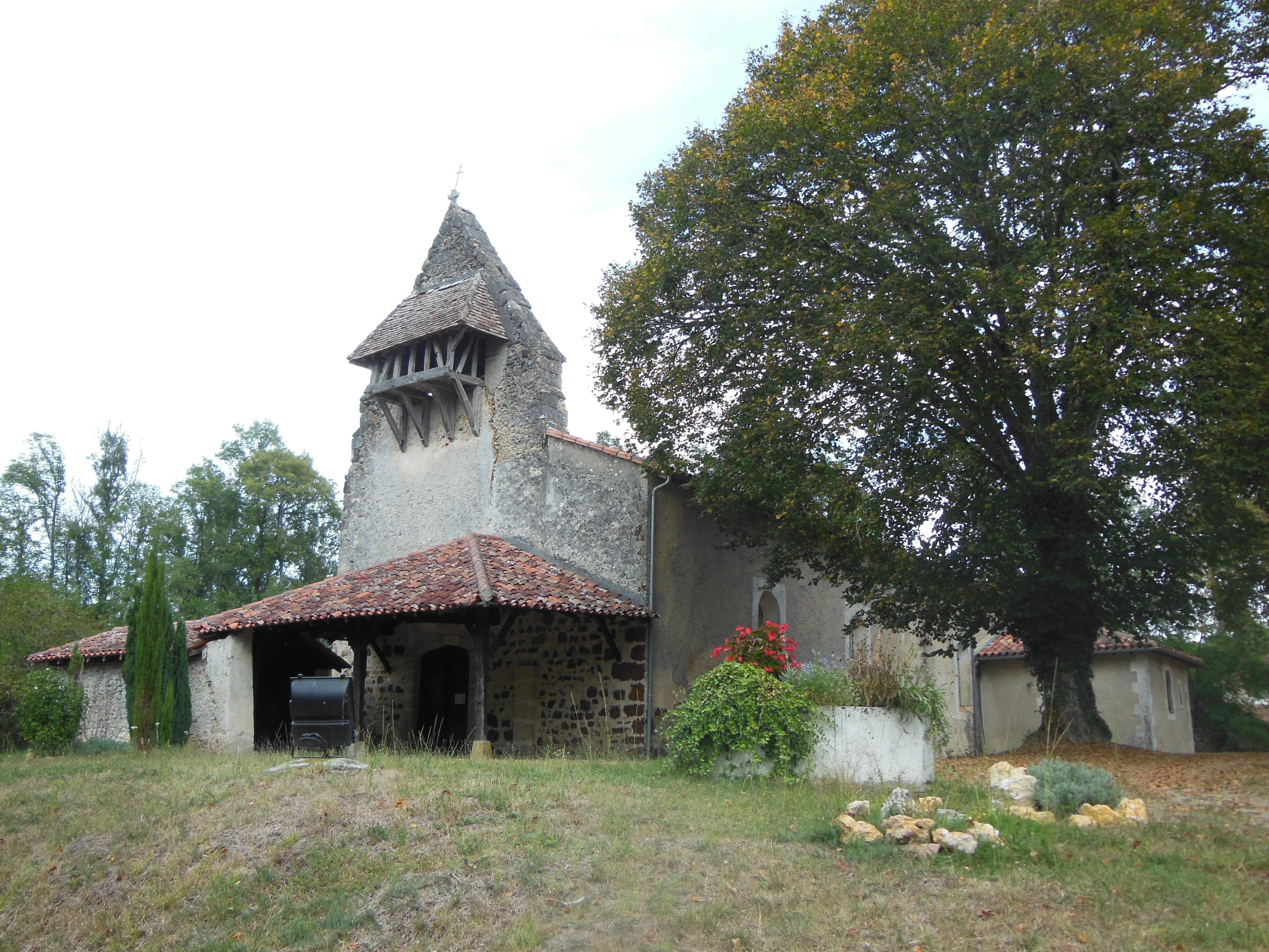 Eglise Saint-de-la-porte-latine de Bergonce, à Bourriot-Bergonce, dans le département français des Landes.